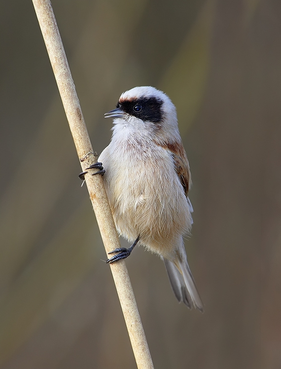 Remiz pendulinus, Olomoucko, CZ